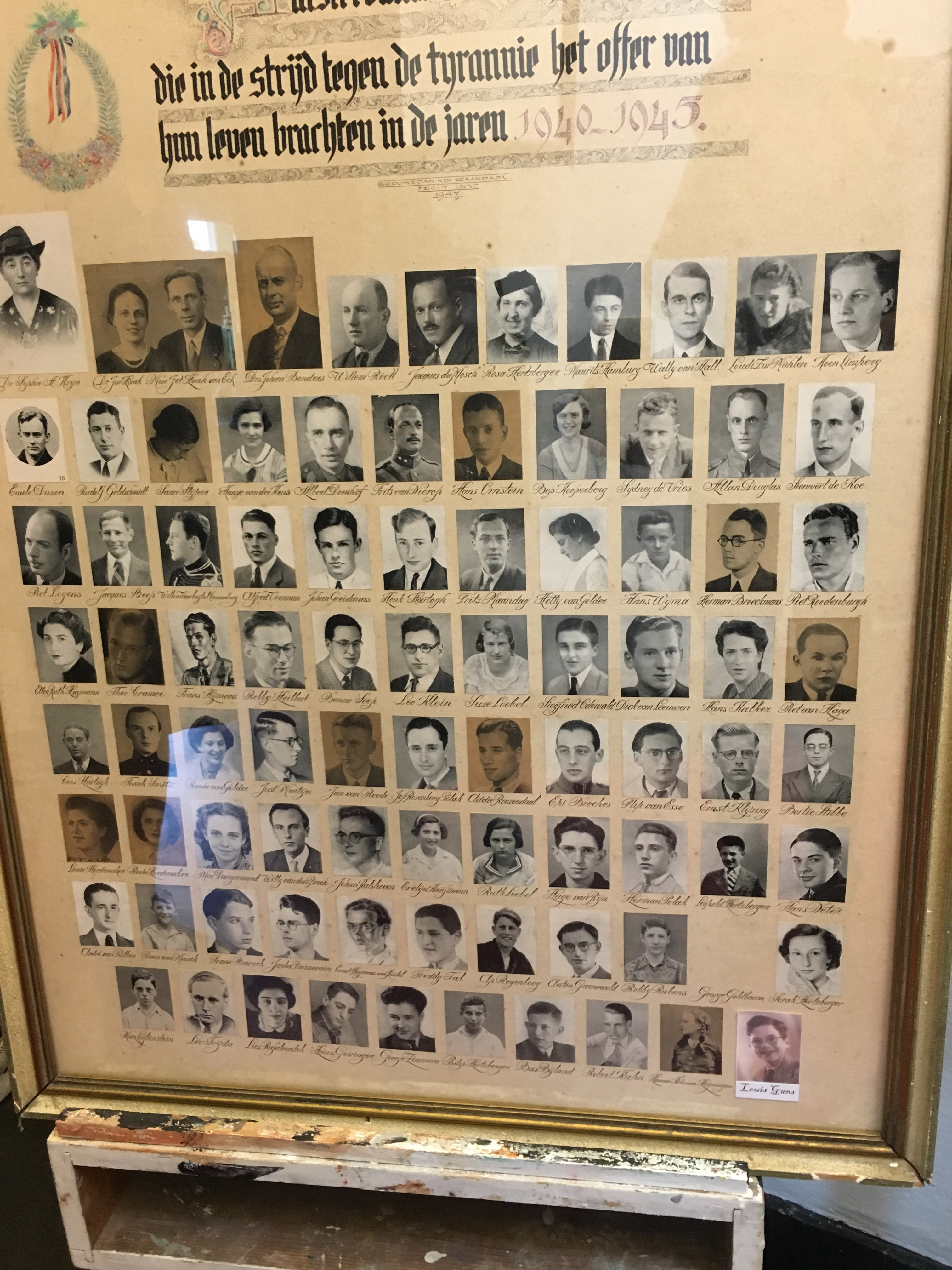 Gedenkplaat met een overzicht van alle namen en foto's van 2e Wereldoorlogslachtoffers onder de docenten en leerlingen van Het Amsterdams Lyceum (1940-1945)